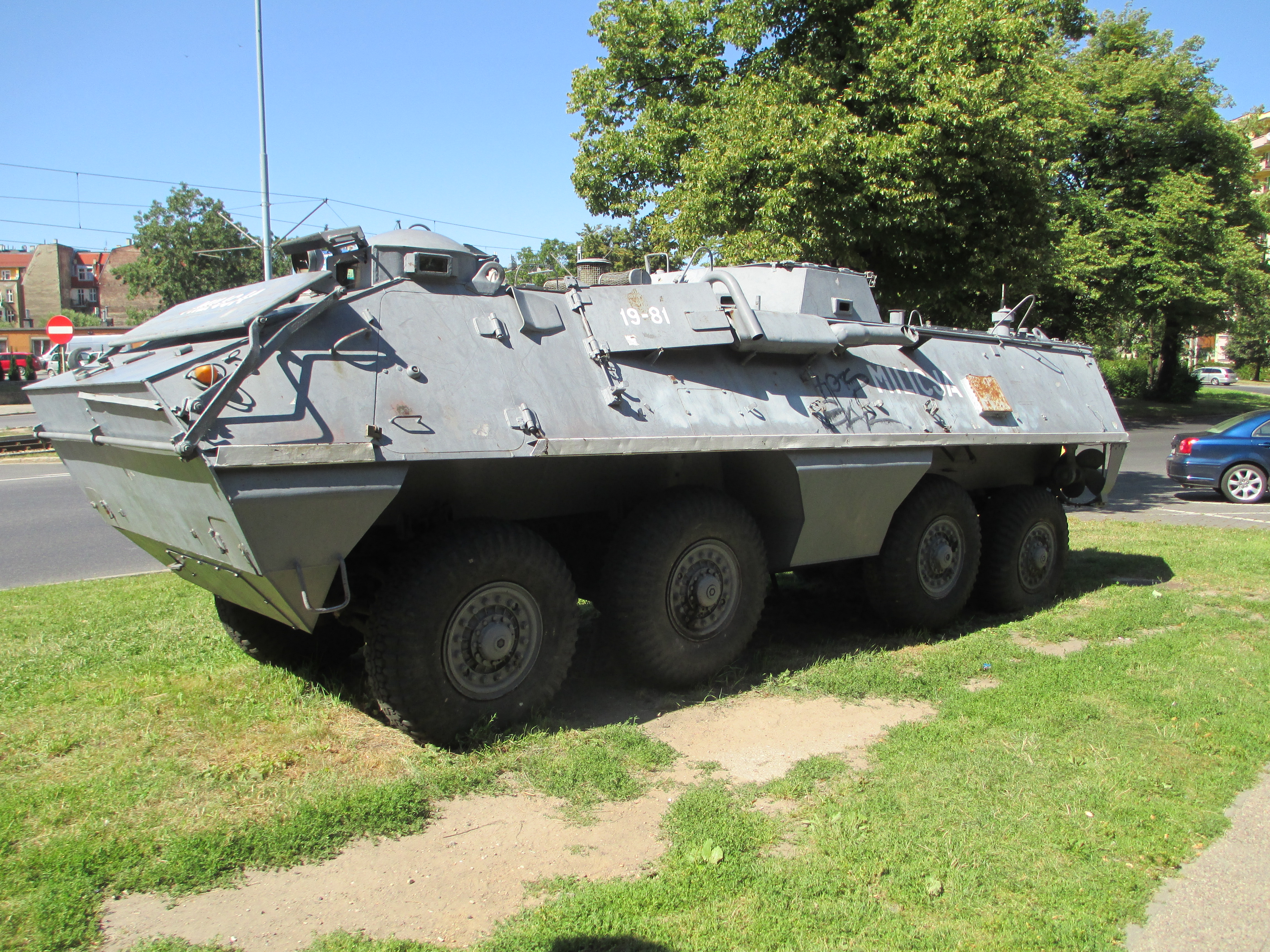 משוריין של המיליציה הפולנית ליד האנדרטה לחללי פועלי המספנות בשנת 1970, גדנסק